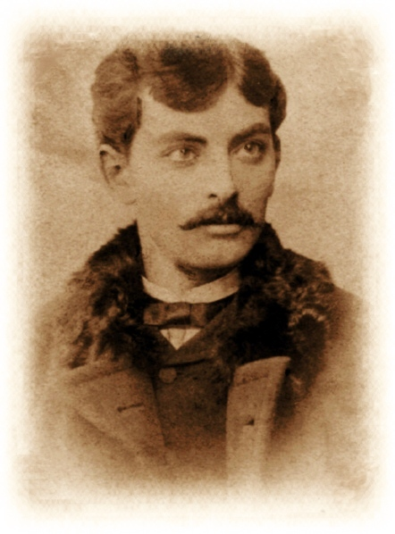 Fotografia ritratto di Francesco Paolo Frontini